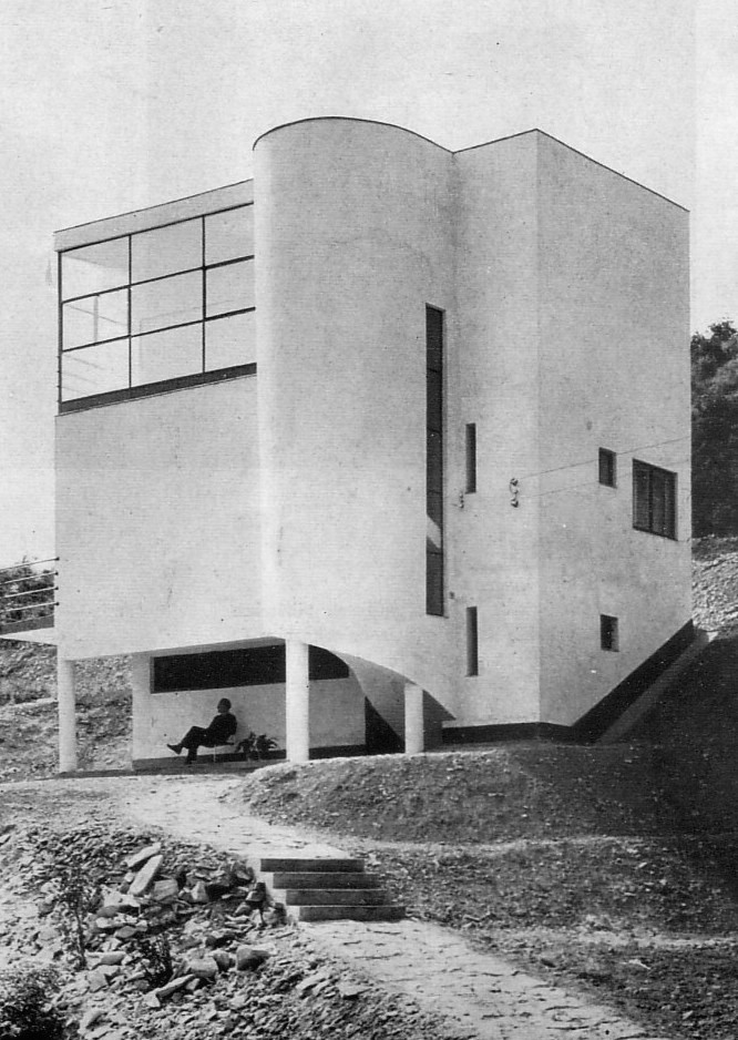 Szépvölgyi út 88. alatti villa, Budapest II. (tervezte Fischer József, épült 1933-34-ben)